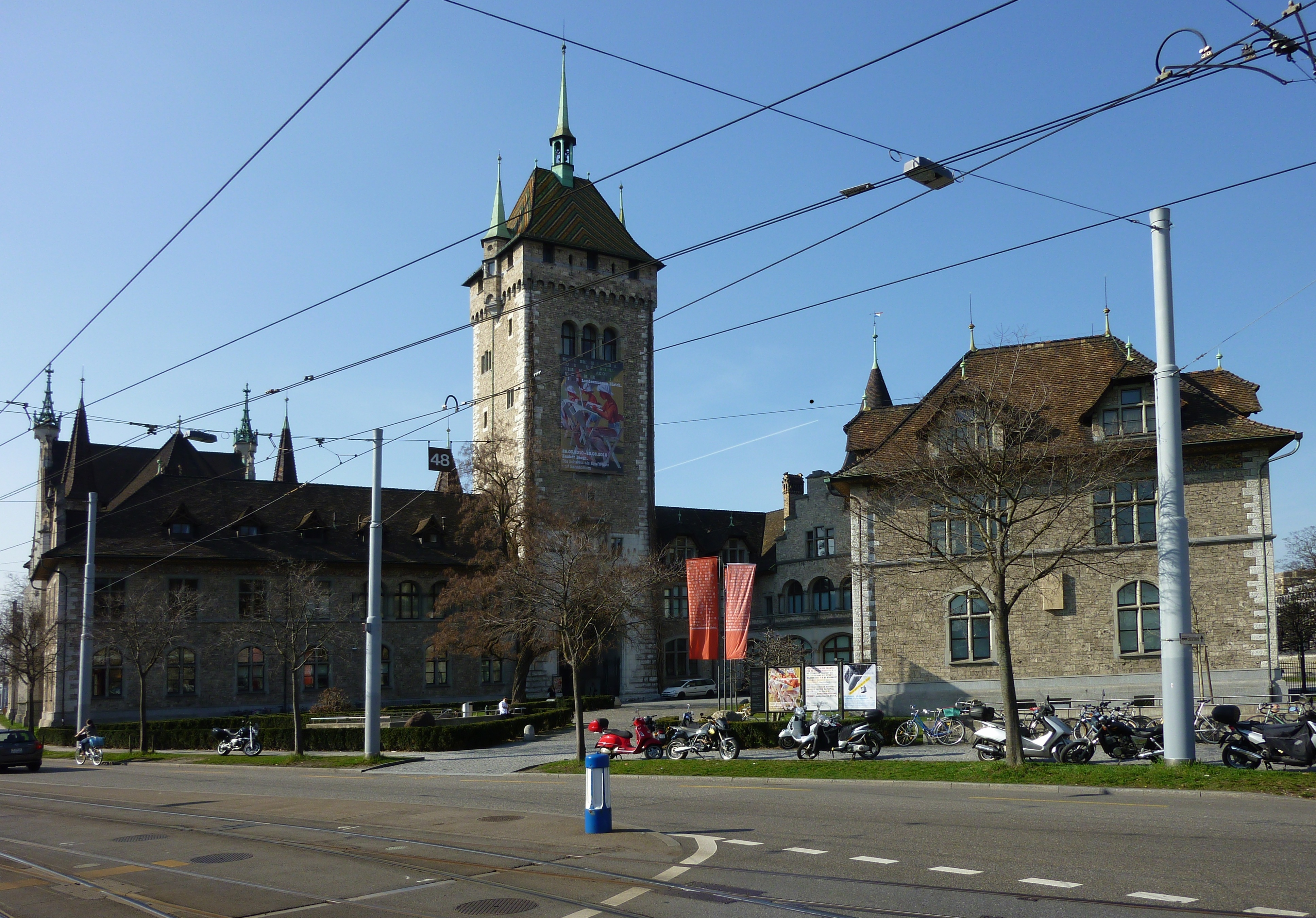 Schweizerisches Landesmuseum in Zürich